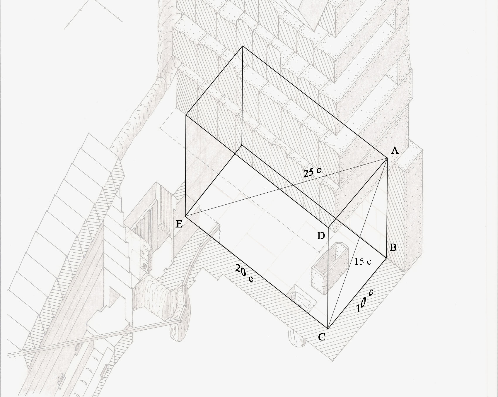 Géométrie de la chambre du roi de la pyramide de Khéops